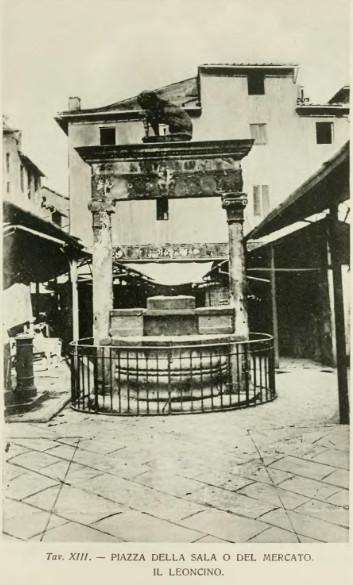 Fontana di San Leonino tratta da p. 89 del volume di Alfredo Chiti, Pistoia, edito a Pistoia nel 1910